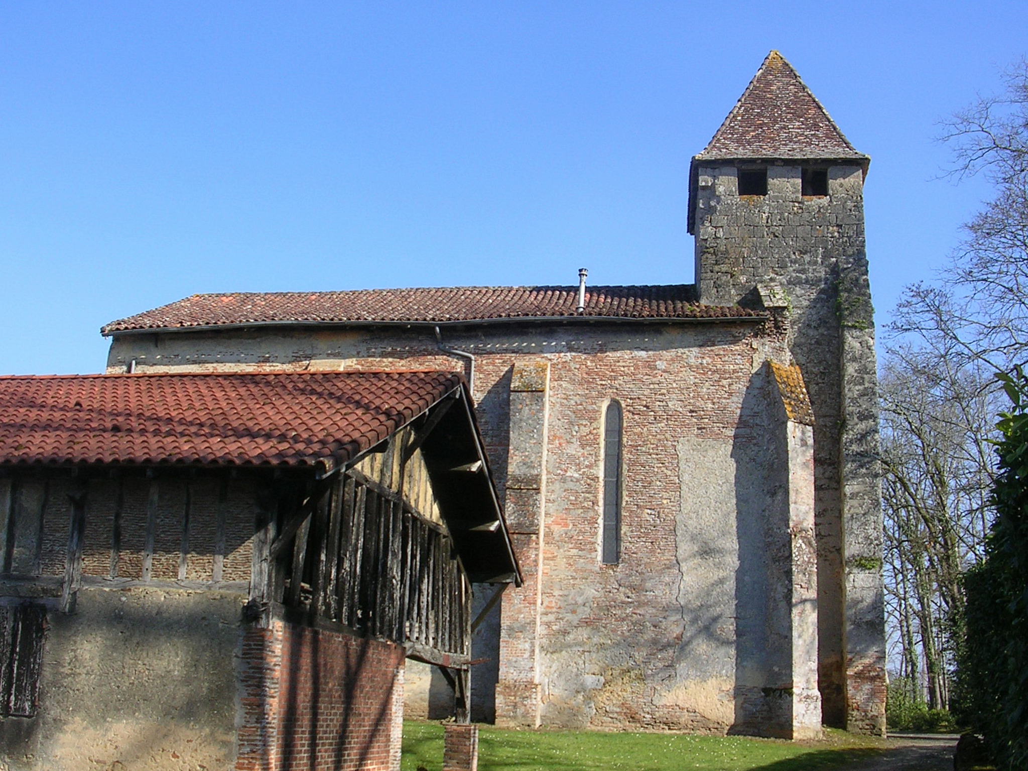 Église Saint-Martin-de-Gaube à Perquie, dans le département français des Landes